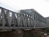 Starý železničný most cez rieku Bodrog pri obci Streda nad bodrogom pred rekonštrukciou Licensing Fotky z rekonštrukcie a zo zaťažovacích skúšok železničného mostu na stránkach Katedry stavebných konštrukcií a mostov stavebnej fakulty Žilinskej univerzity